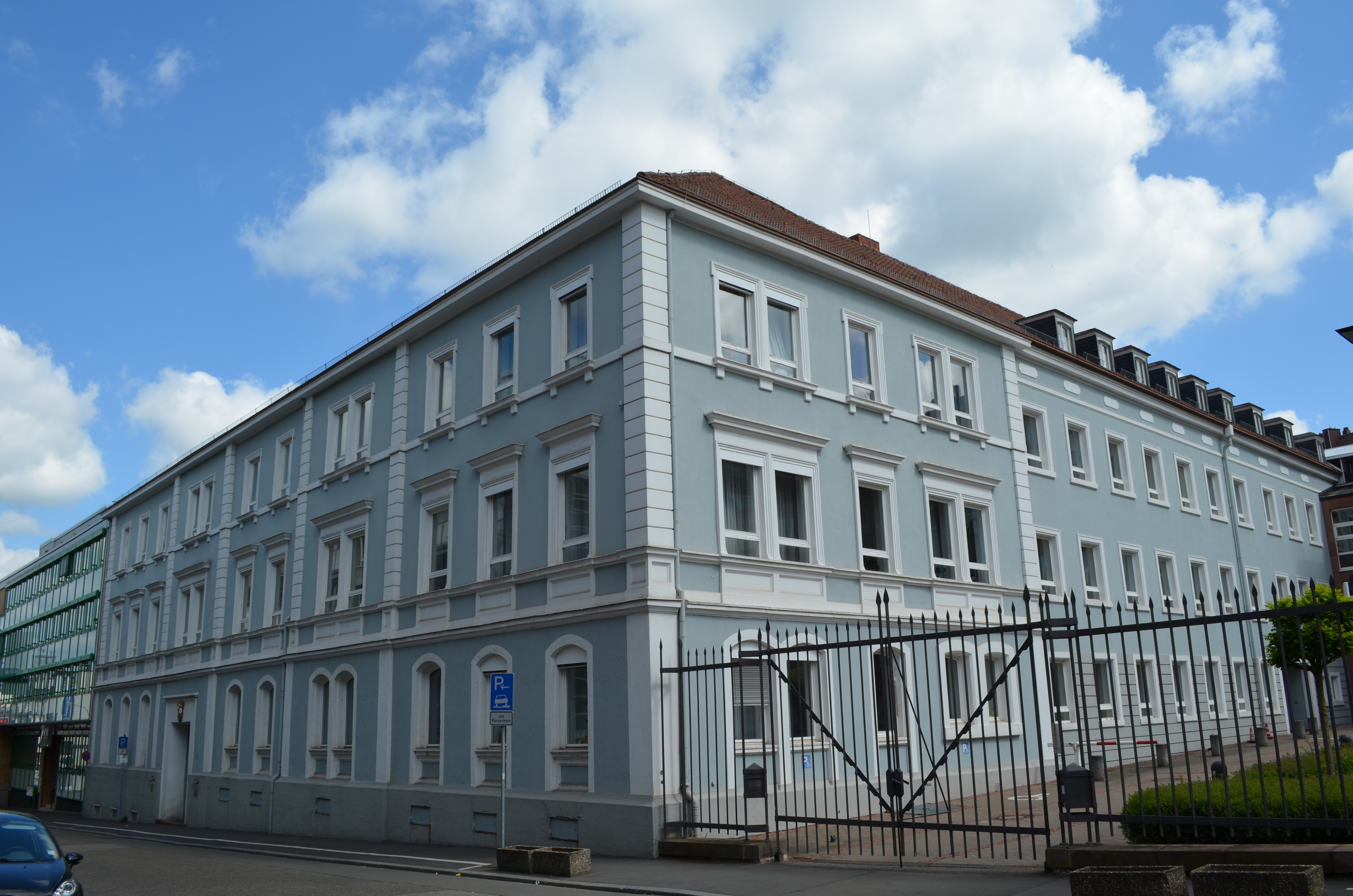 Bahnhofstraße 26 in Pirmasens: Altbau des Amtsgerichts Pirmasens, heute Teil des Behördenkomplexes in der Bahnhofstraße mit Amtsgericht und Katasteramt; Neorenaissancebau aus dem späten 19. Jahrhundert, Architekt Ludwig von Stempel